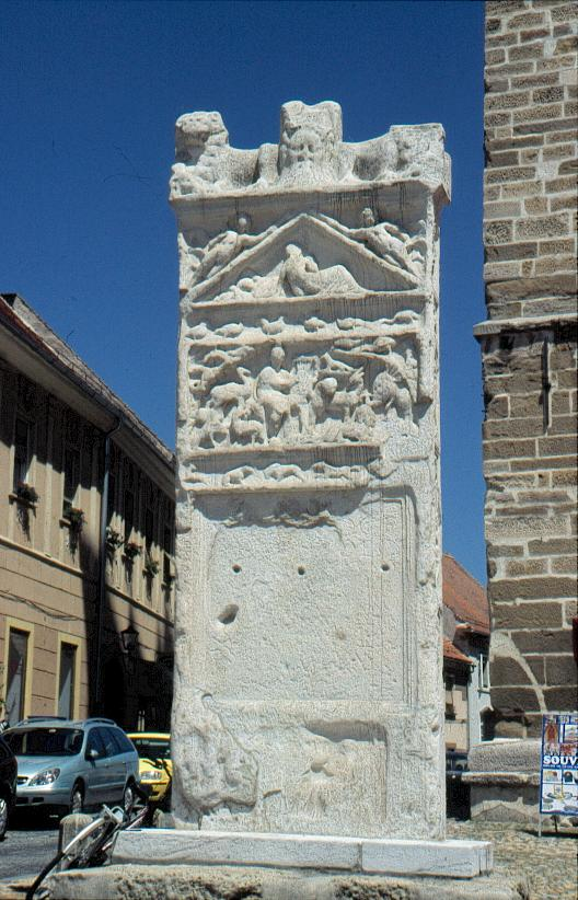 Eigen opname 2006